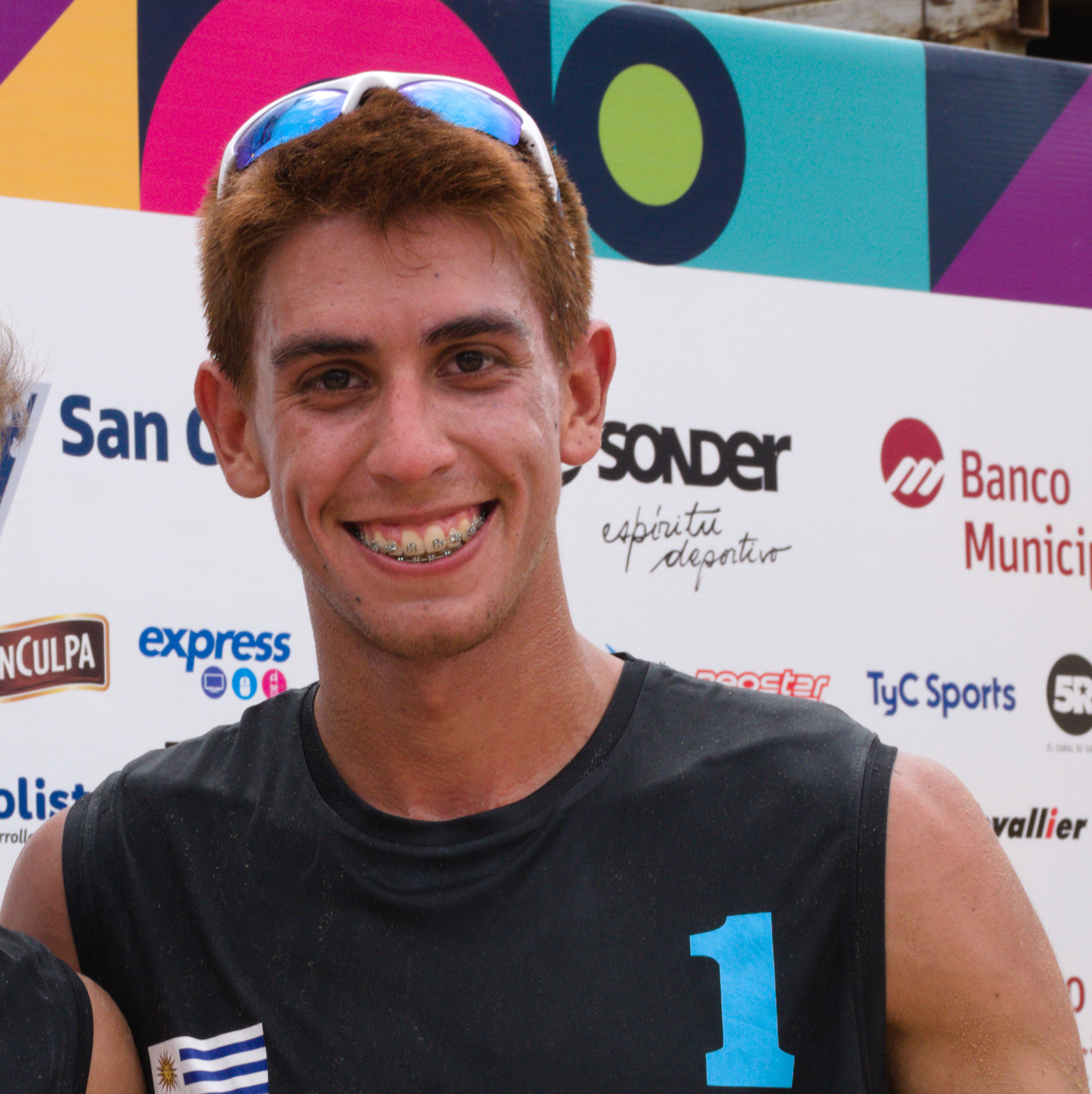 Uruguay contra Chile en las Semifinales de Voley de Playa en los Juegos Suramericanos de Playa 2019